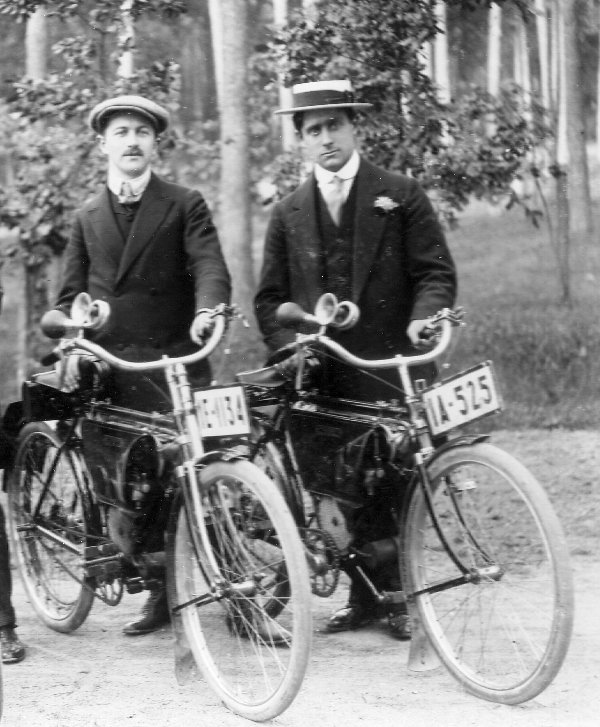 Fredy Budzinski, deutscher Journalist und Radsportler (links) und John Stol, niederländischer Radrennfahrer, im Berliner Grunewald (rechts).